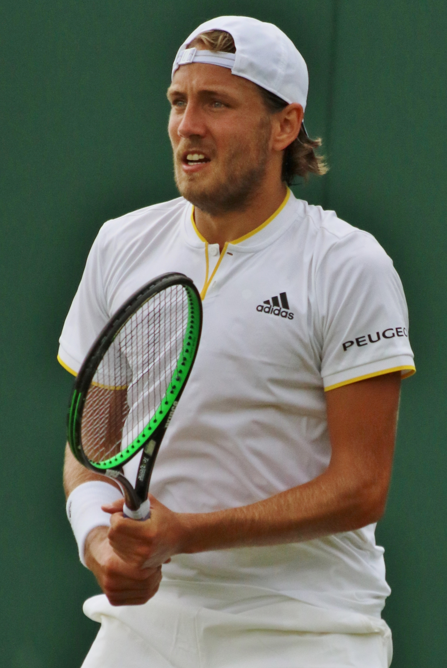 Pouille WM17 (32)